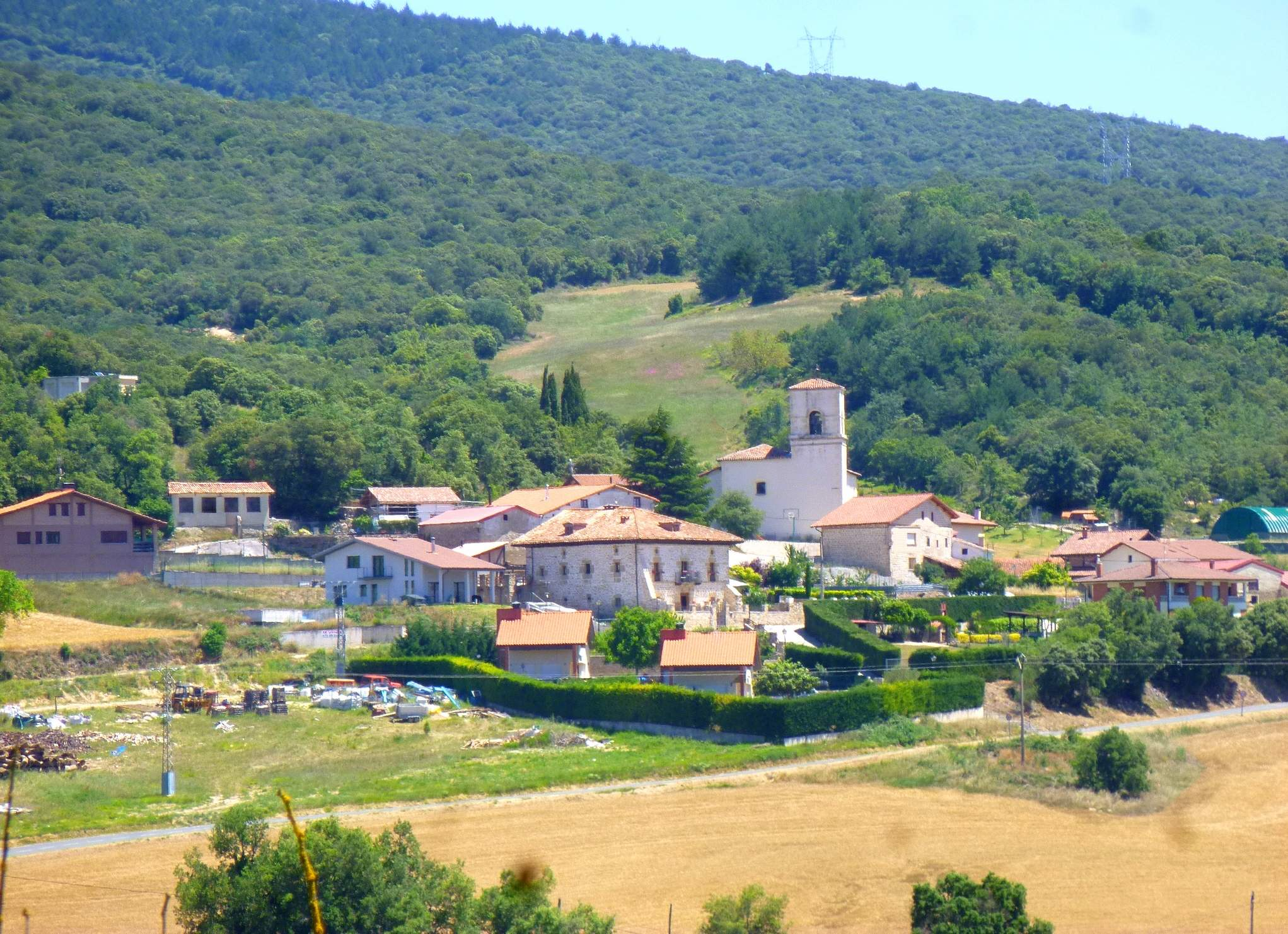 Anuntzeta/Anúcita (Ribera Alta, Álava)